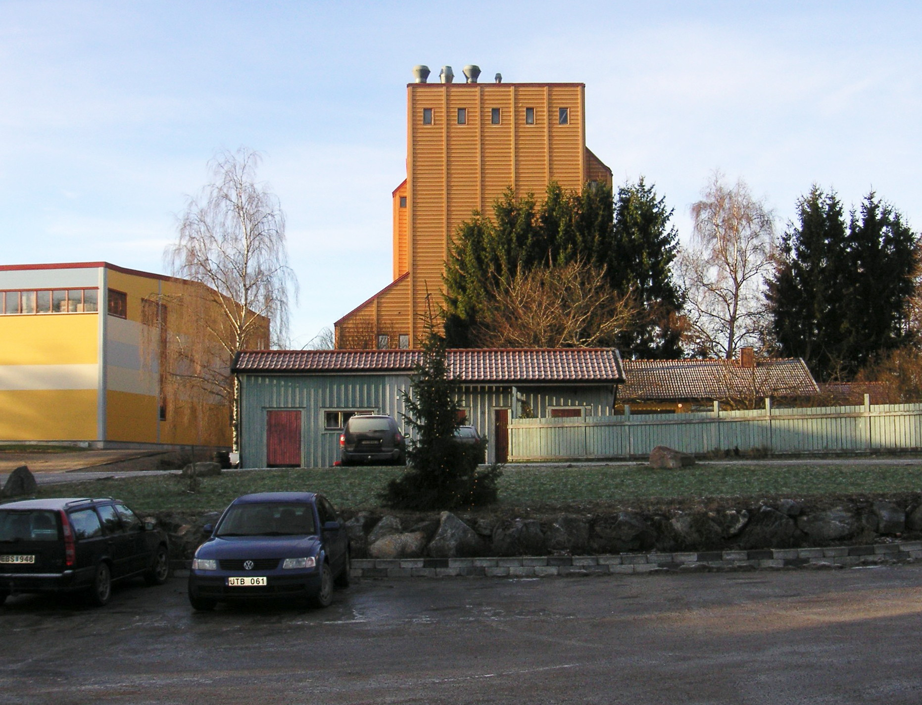 Saltåkvarn